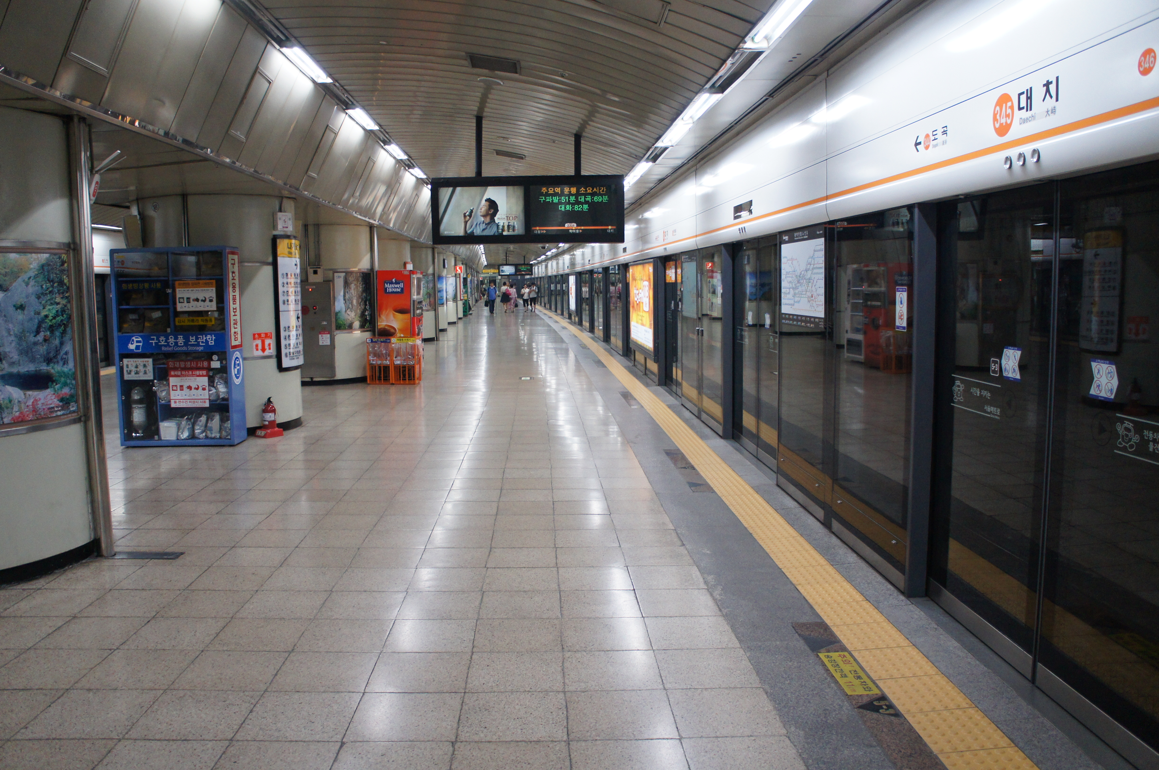 대치역 승강장